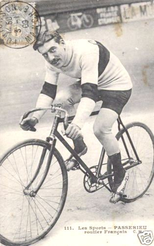 Carte postale ancienne série C.Malcuit N°111: Georges Passerieu deuxième du Tour de France 1906 et vainqueur de Paris-Roubaix et de Paris-Tour en 1907